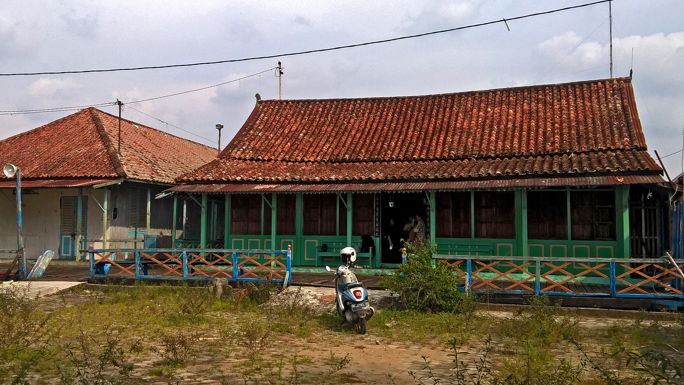 Rumah Ong Boen Tjiet, Kel. 3-4 Ulu, Kec. Seberang Ulu I.